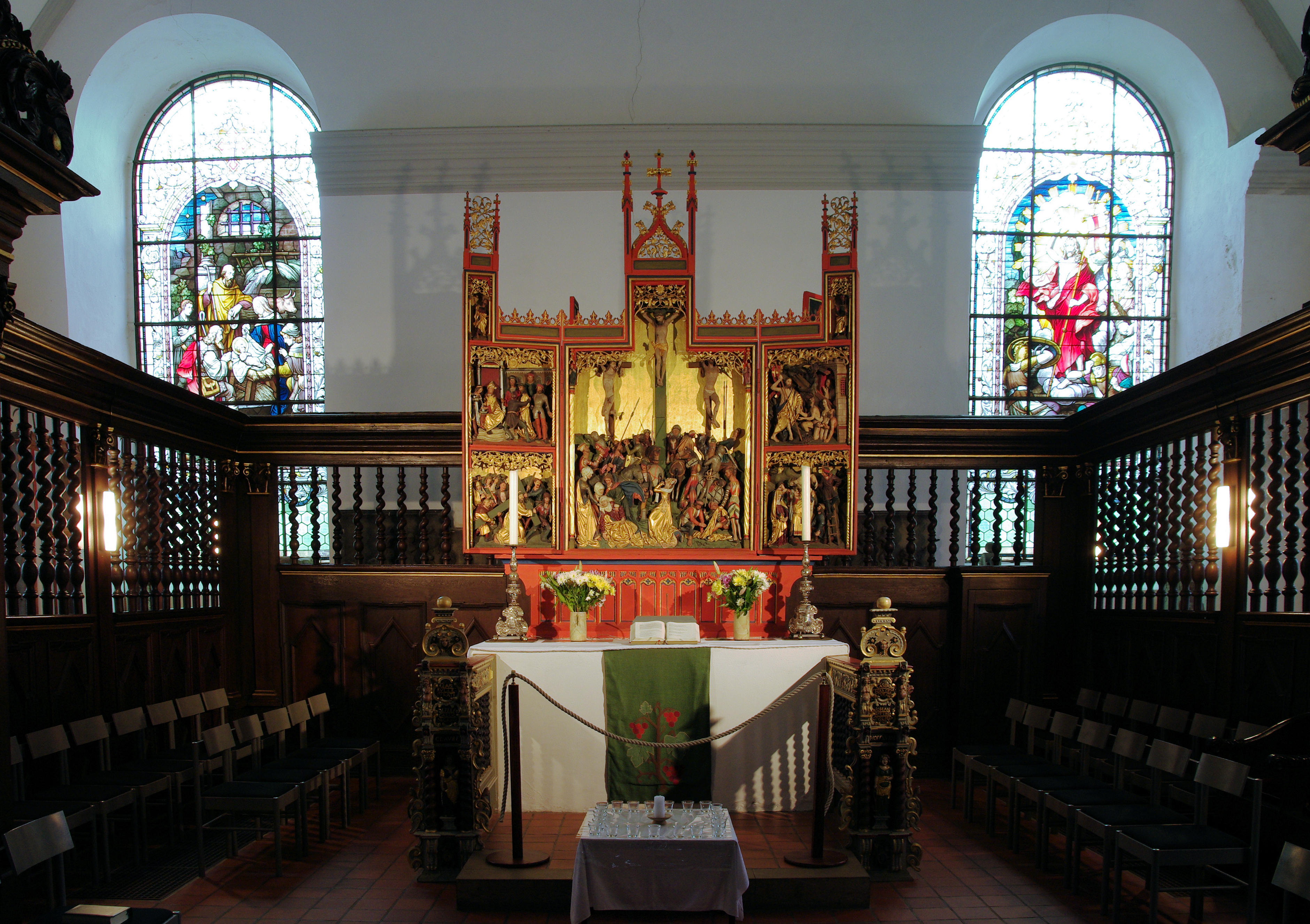 Der Altar